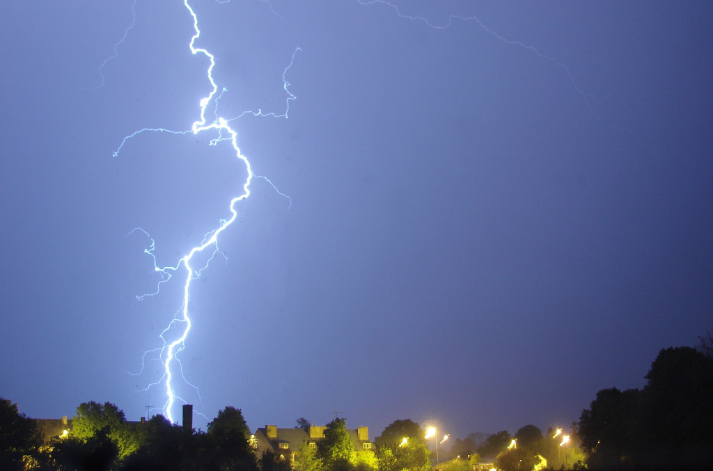 Zdjęcie wykonane w miejscowości Rymań. Północna część Polski.